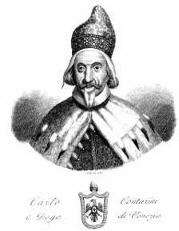 Carlo Contarini (1580-1656)